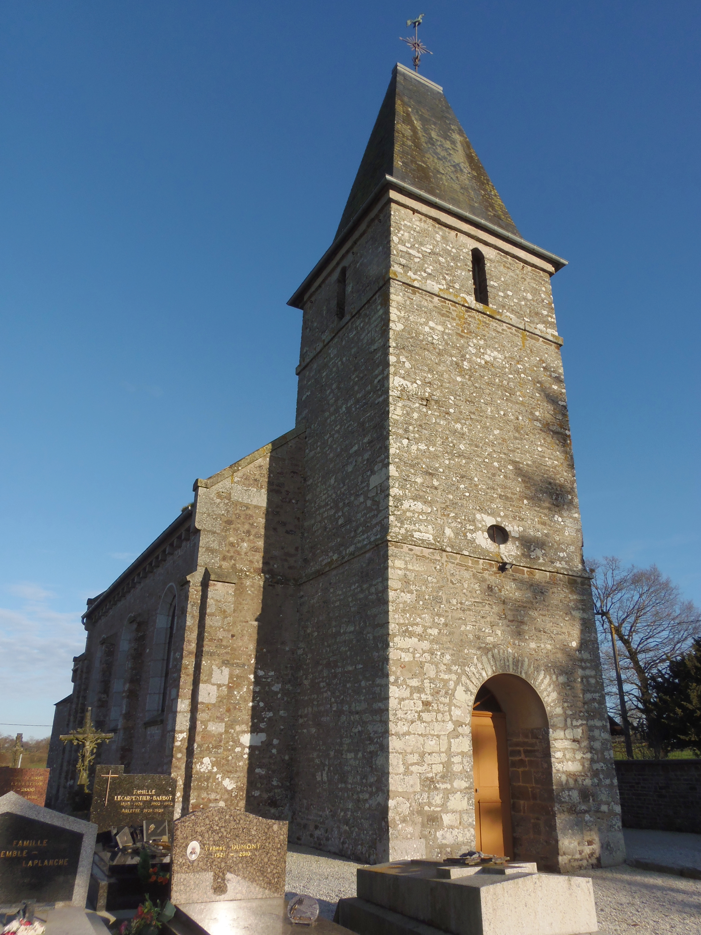 Beaulieu (Normandie, France). L'église Notre-Dame.